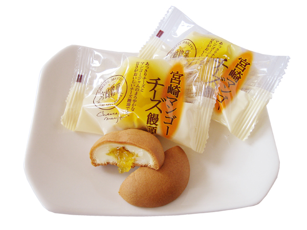 洋菓子に近い